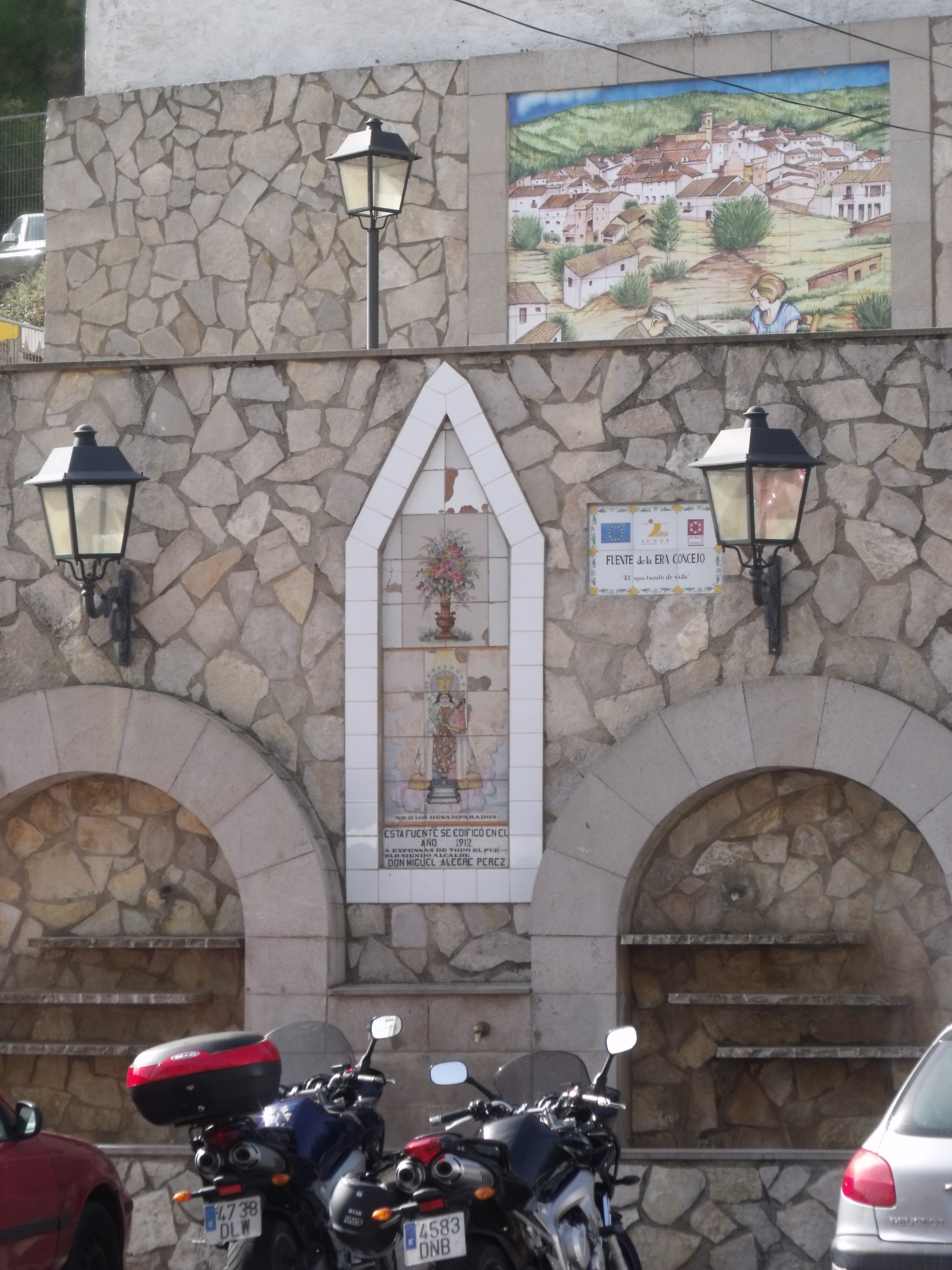 Fuente de la plaza del concejo, 2